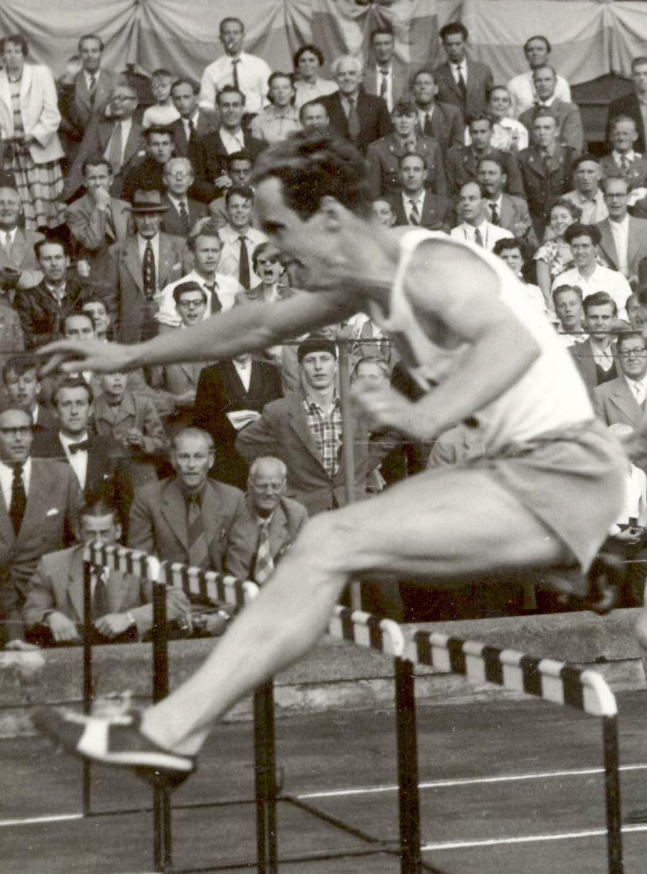 Sven-Olov Eriksson at an international against Hungary in 1954